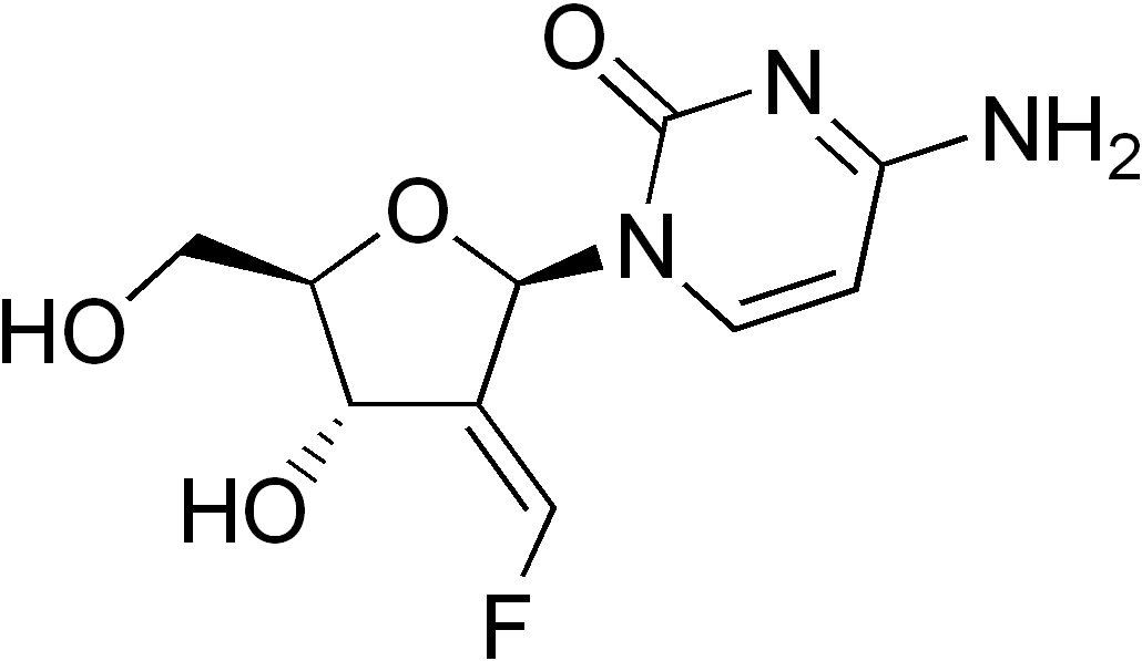 chemical structure of tezacitabine